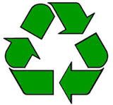 Знакот за рециклирање